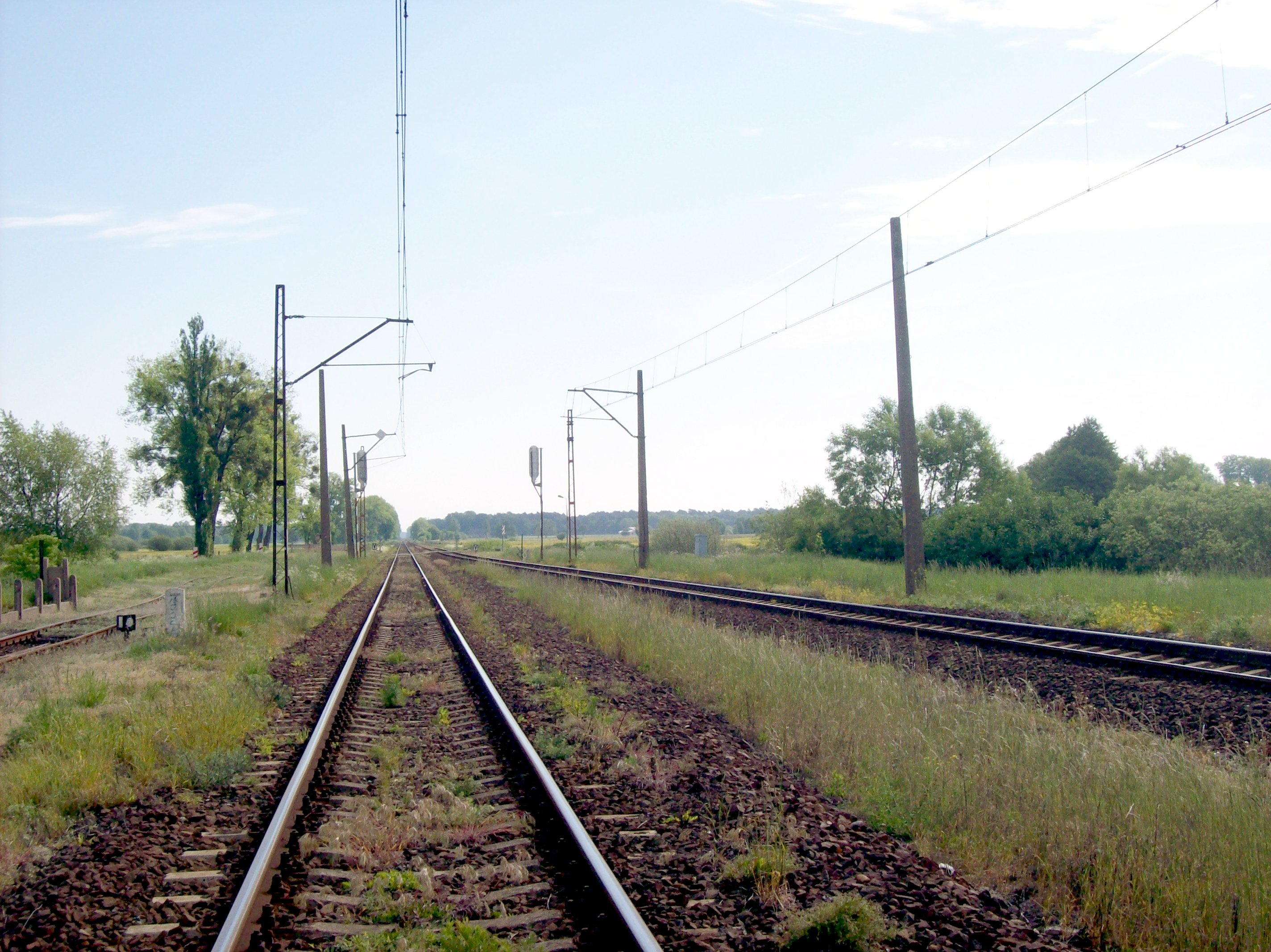 Widok na tory kolejowe tuż za stacją Krzyż, gdzie kończy się trakcja elektryczna.